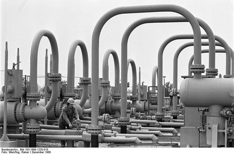 Bad Lauchstädt, Gasspeicher ADN-ZB/Weisflog 20.12.89 Bez. Halle: Gasspeicher Eine Kapazität von einer Milliarde Kubikmetern hat der Gas-Untergrundspeicher des Gaskombinates Schwarze Pumpe in Bad Lauchstädt. Trocknung, Reinigung und Einspeisung des Gases erfolgen in diesen oberirdischen Anlagen. 780 bis 950 Meter tiefer liegen die durch Aussolung von Salzlagerstätten gewonnenen Speicherräume. Das Erschließen von Möglichkeiten zum Bau derartiger Anlagen auf DDR-Territiorium ist Bestandteil eines zu Monatsbeginn zwischen dem Gaskombinat Schwarze Pumpe und der Ruhrgas AG Essen unterzeichneten Kooperationsabkommens. Die vorgesehenen Speicherkapazitäten sollen zur Stabilisierung der Gasversorgung in der BRD und in Berlin (West) beitragen.